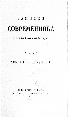 Жихарев, издание Кожанчикова